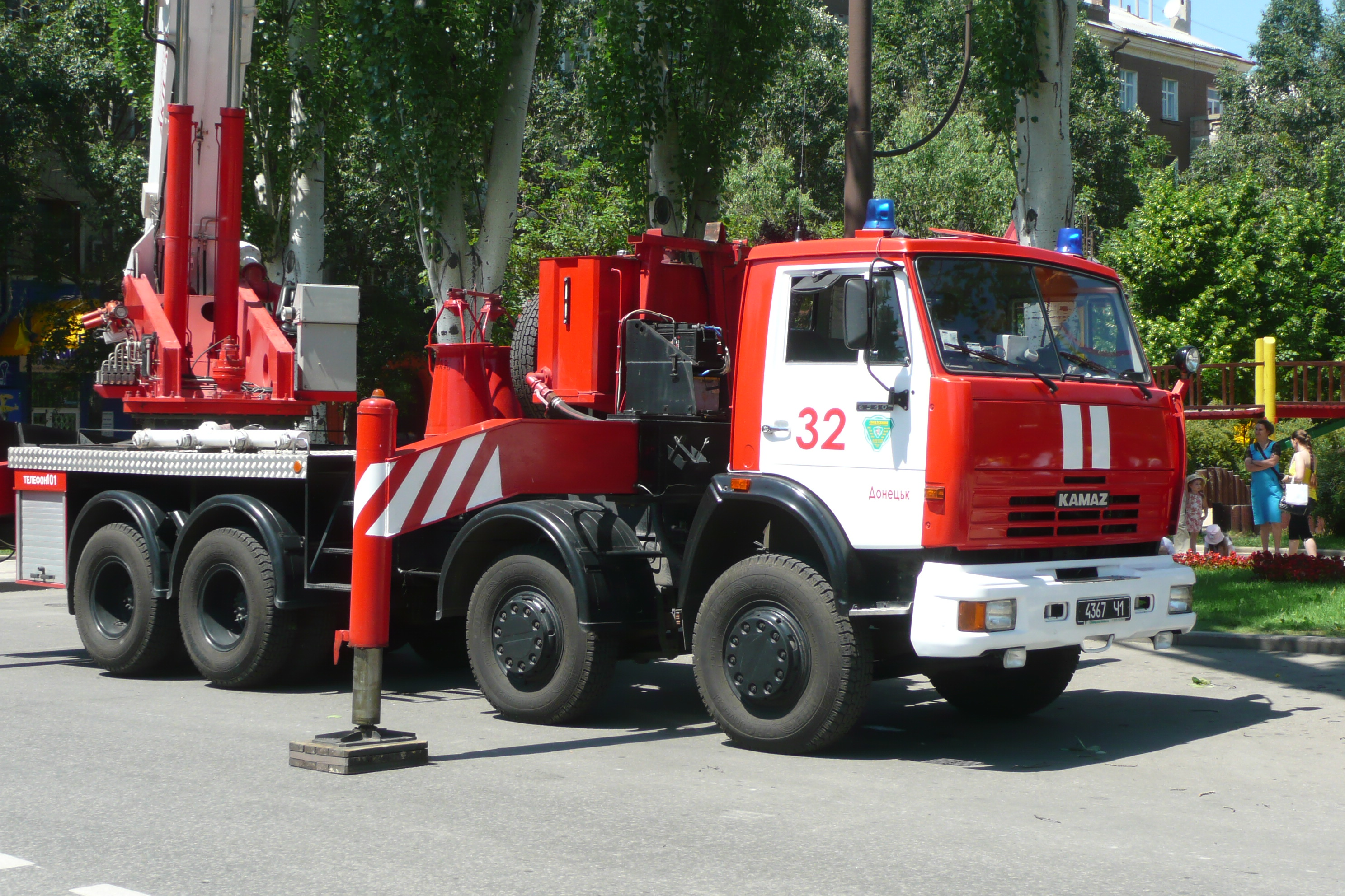 День защиты детей в Донецке